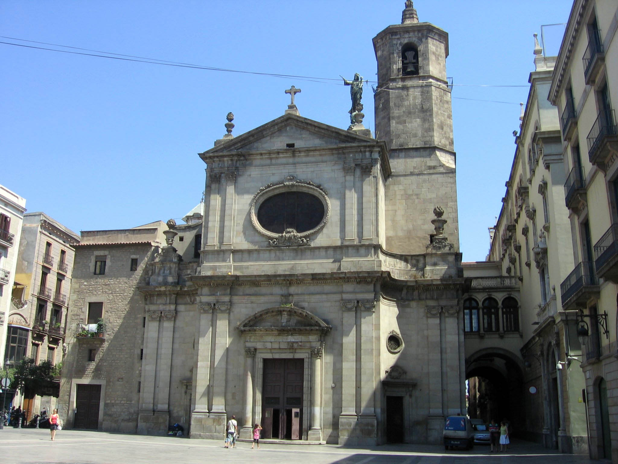 Basílica de la Merced